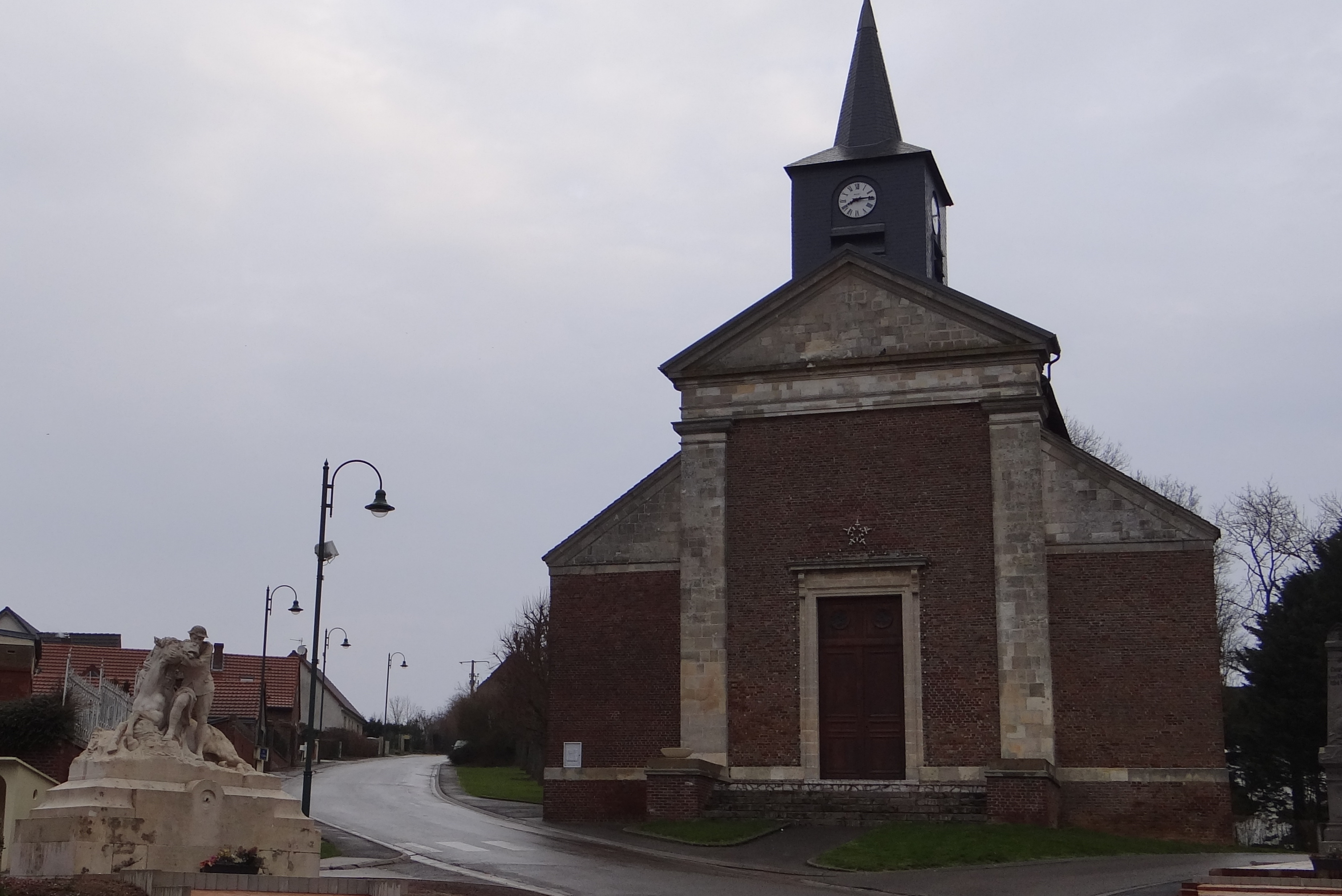 Chipilly - L'église